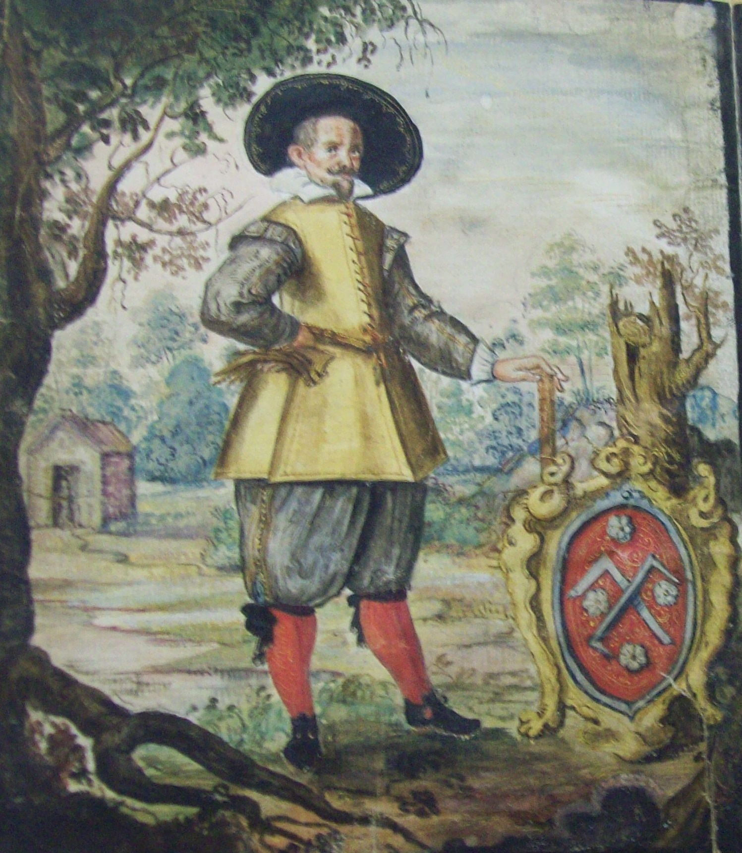 Georg Ridinger, deutscher Architekt und Baumeister (1568-1617), Zeitgenössische Deckfarbenmalerei aus dem Aschaffenburger Zunftbuch der Kaufleute, Rechte abgelaufen. Zunftbuch der Krämerzunft 1582-1668 im Stadt- u. Stiftsarchiv Aschaffenburg